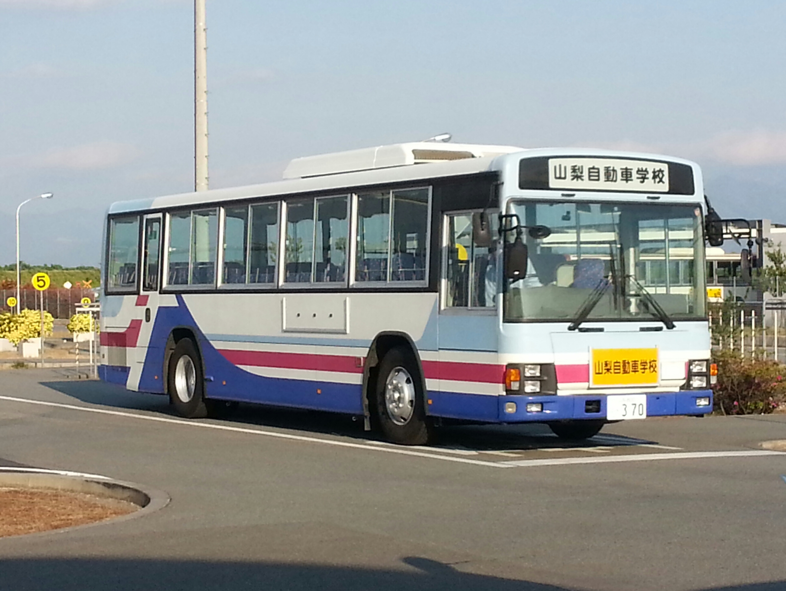 いすゞエルガの教習車仕様車です